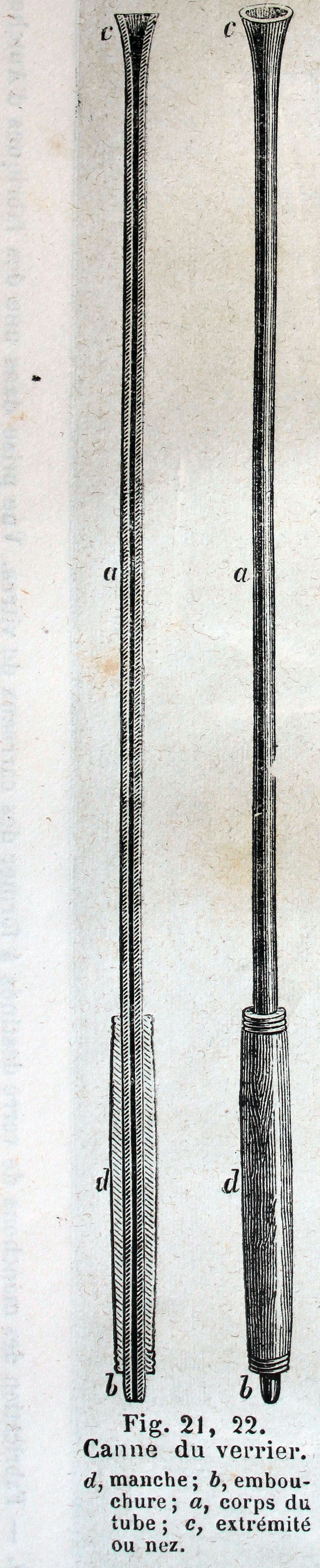 Ilustraciones de la obra : Les merveilles de l'industrie ou, Description des principales industries modernes / par Louis Figuier. - Paris : Furne, Jouvet, [1873-1877]. - Tome I